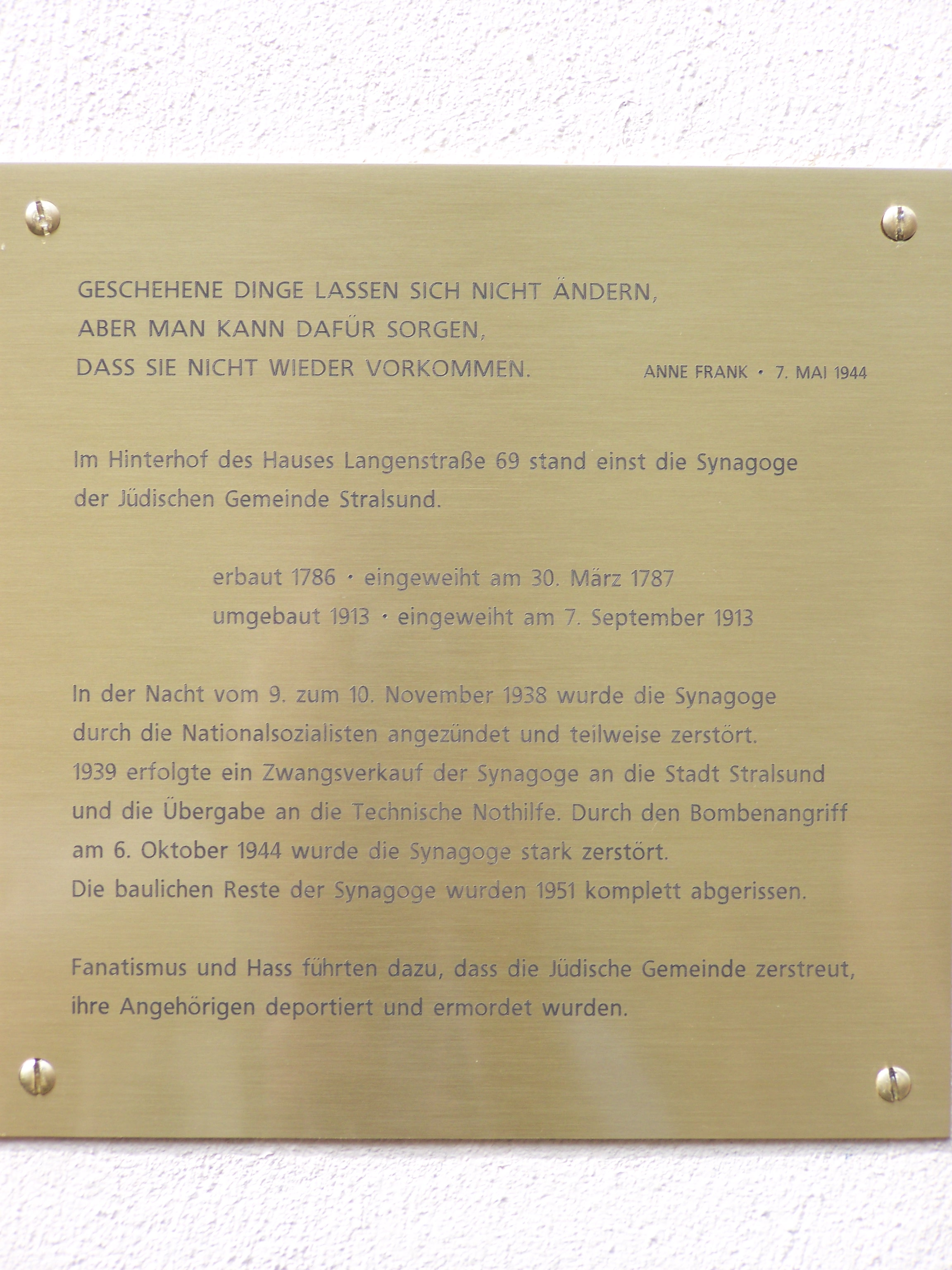 Das Foto zeigt die Erinnerungstafel an die Synagoge Stralsund. Die Tafel am Haus Langenstraße 69 erinnert an die auf dem Hof dieses Hauses befindliche Synagoge, die 1938 teilweise zerstört wurde. Die Tafel wurde am 28.04.2009 in Anwesenheit der Bundeskanzlerin Angela Merkel und des Landesrabbiners William Wolff eingeweiht.